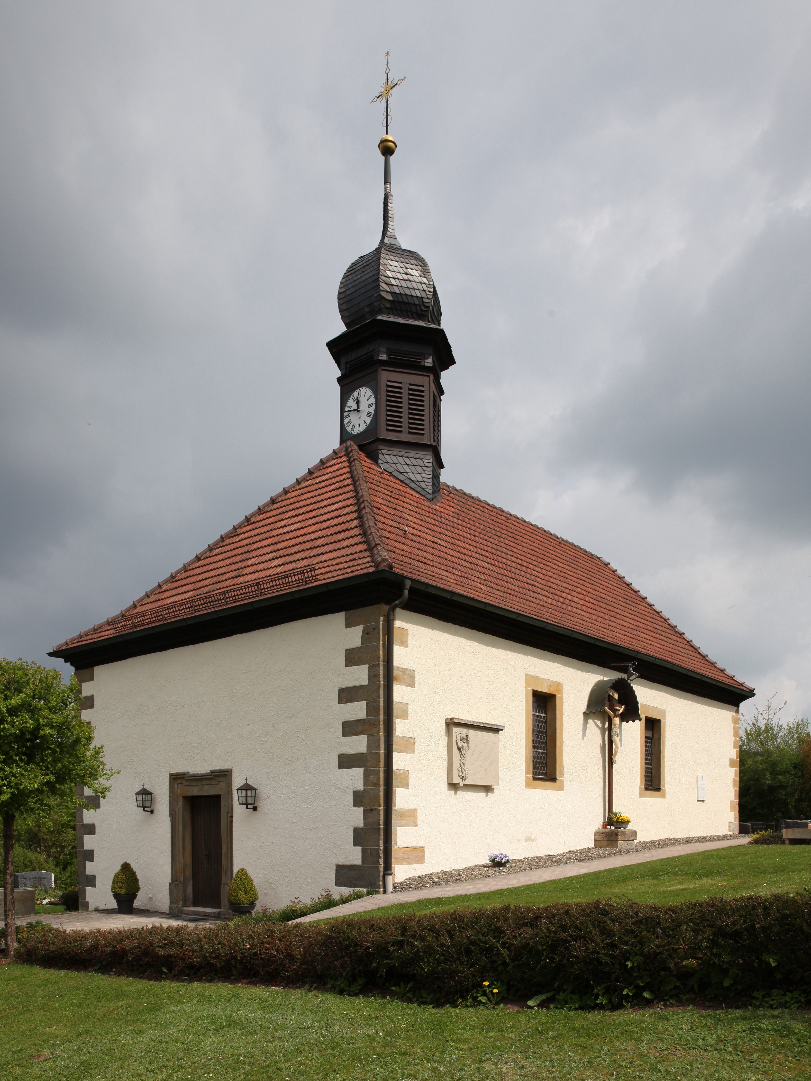 Mater Dolorosa in Altenhof